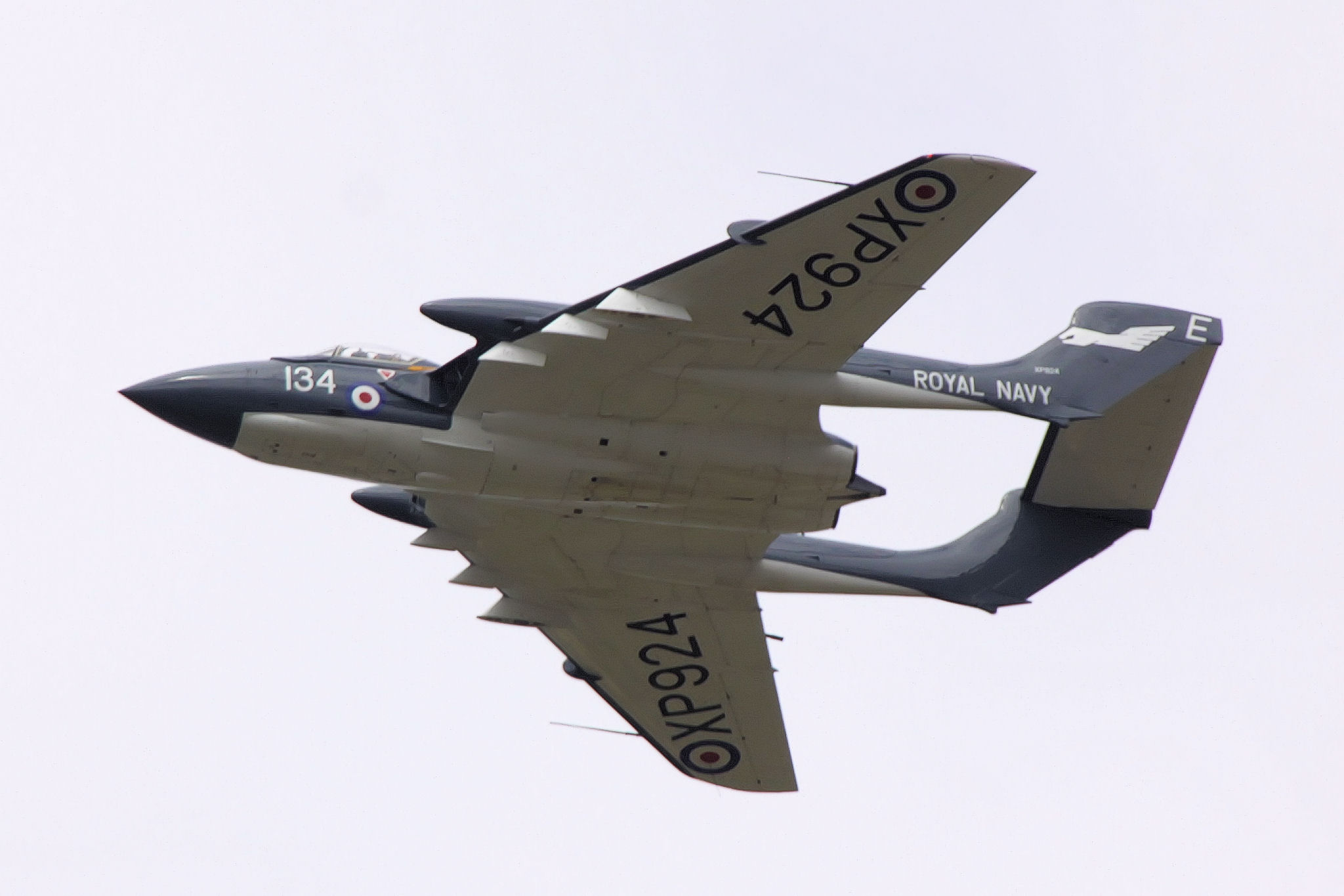 Sea Vixen - RIAT 2009